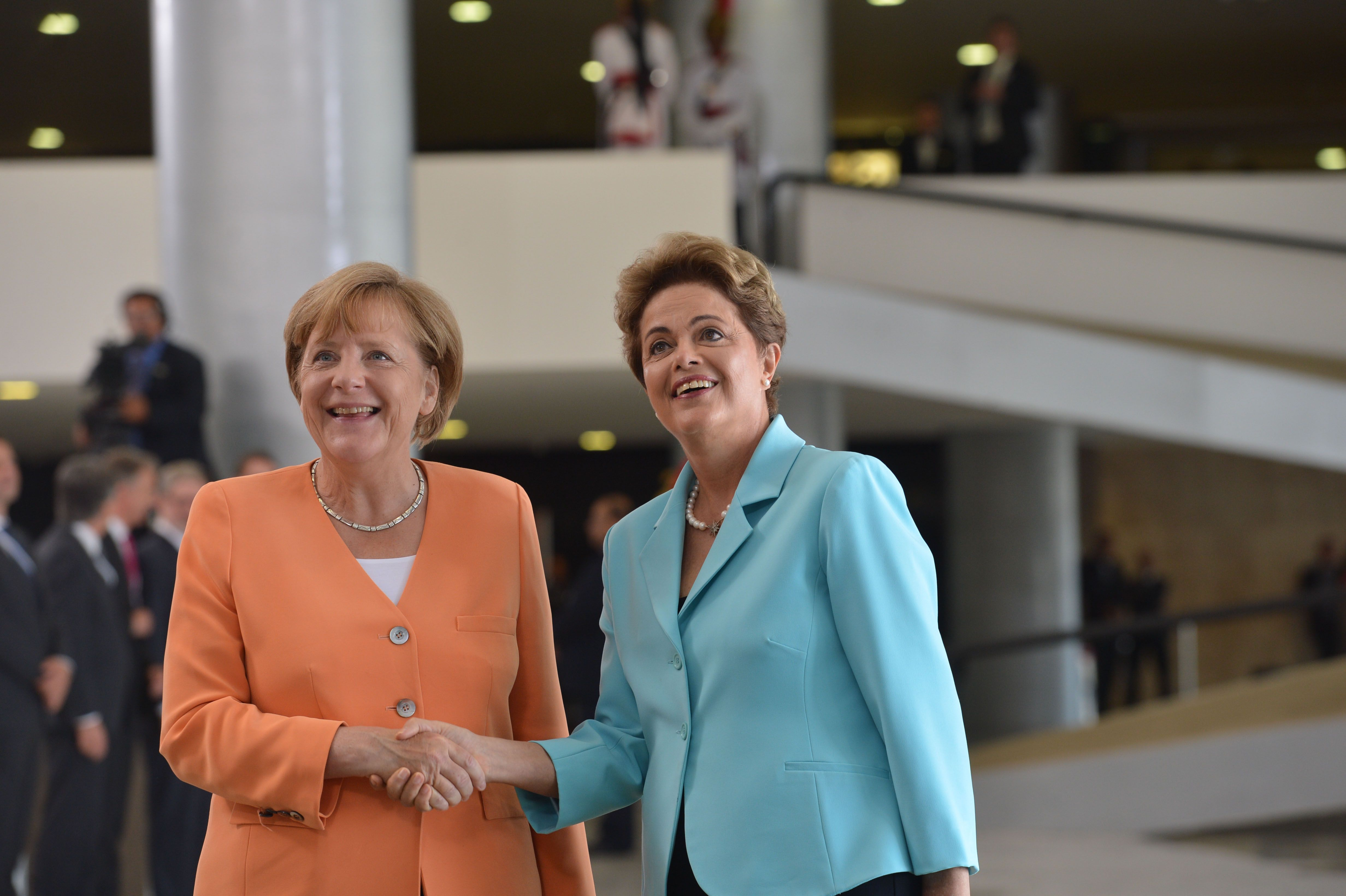 A presidenta Dilma Rousseff recebe a chanceler da Alemanha, Angela Merkel em cerimônia oficial no Palácio do Planalto (Elza Fiùza/Agência Brasil)